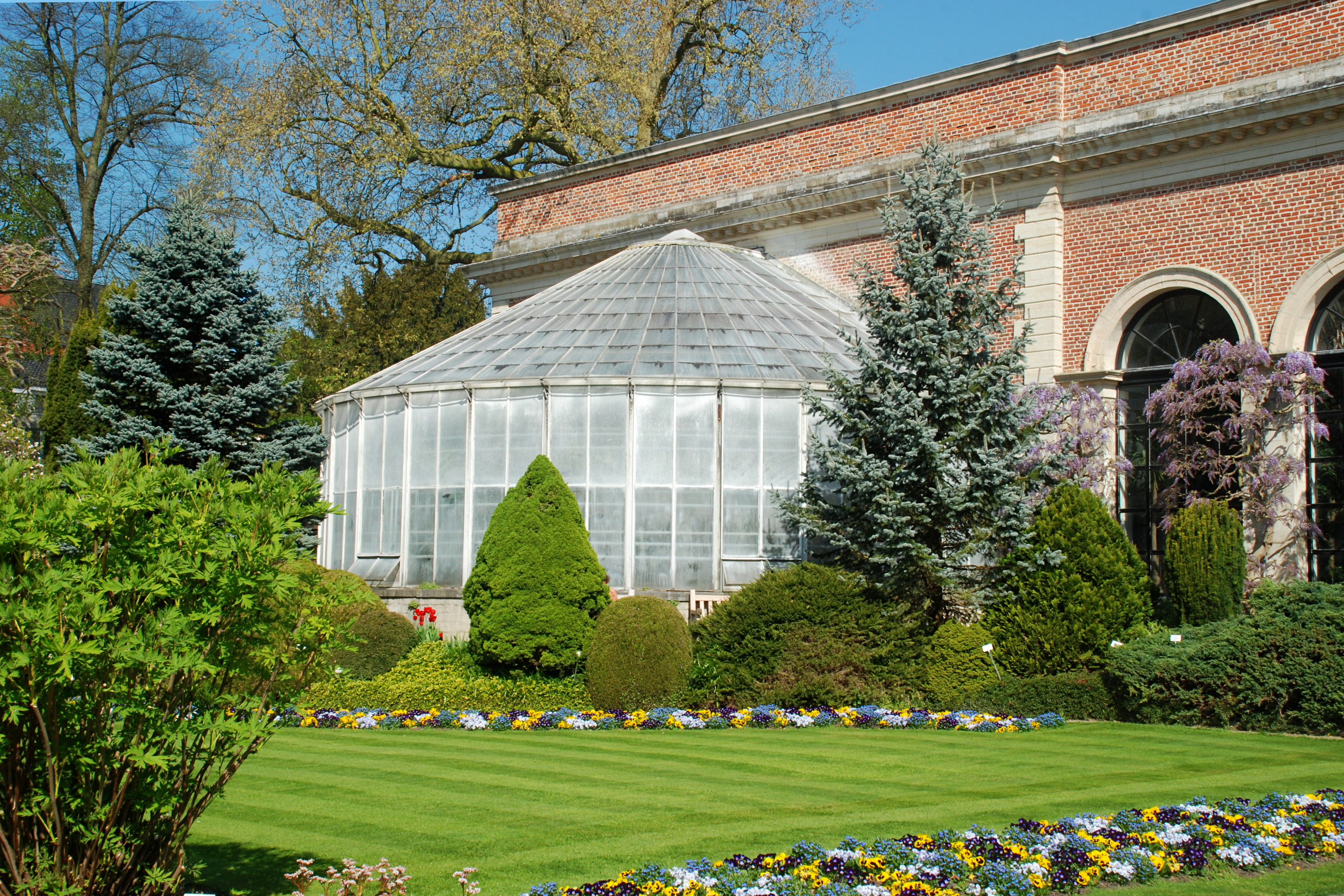 Belgique - Louvain - Jardin botanique (Kruidtuin) - orangerie néo-classique (architecte Charles Vander Straeten - 1821)